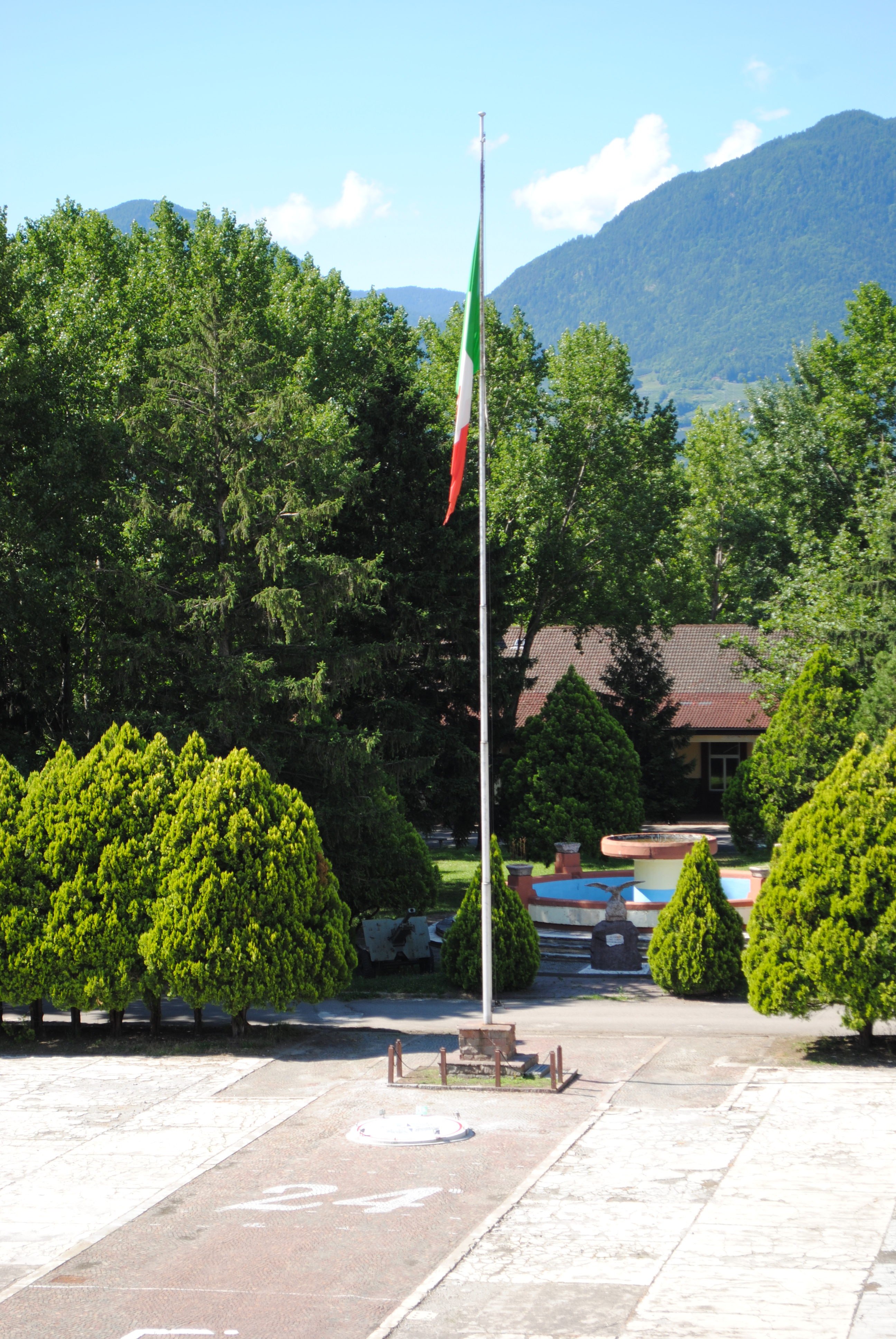 Pennone bandiera